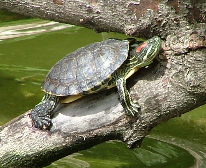 Trachemys scripta elegans, Zoo di Roma, Italia